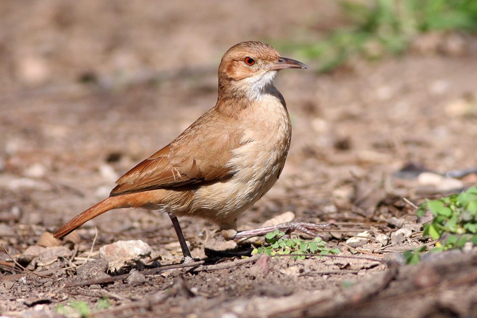 Costanera Sur,Buenes Aires